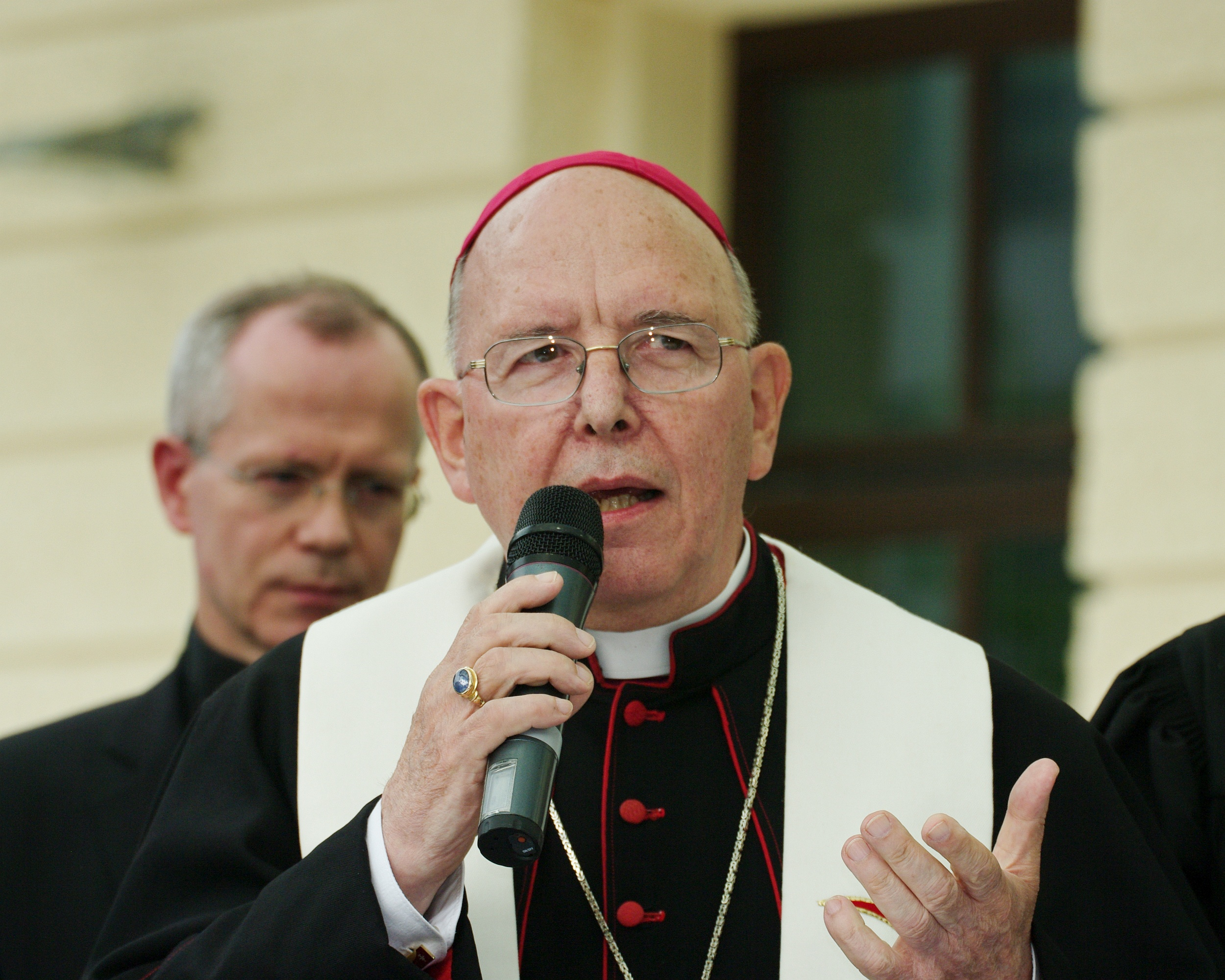 Klaus Küng, römisch-katholischer Bischof der Diözese St. Pölten, während der Eröffnungsfeier des neuen Hauptbahnhofes in St. Pölten am 10. September 2010